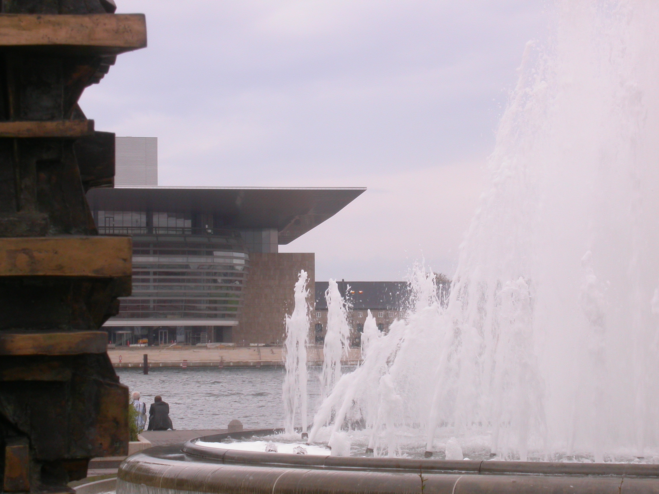 Amaliehaven 006